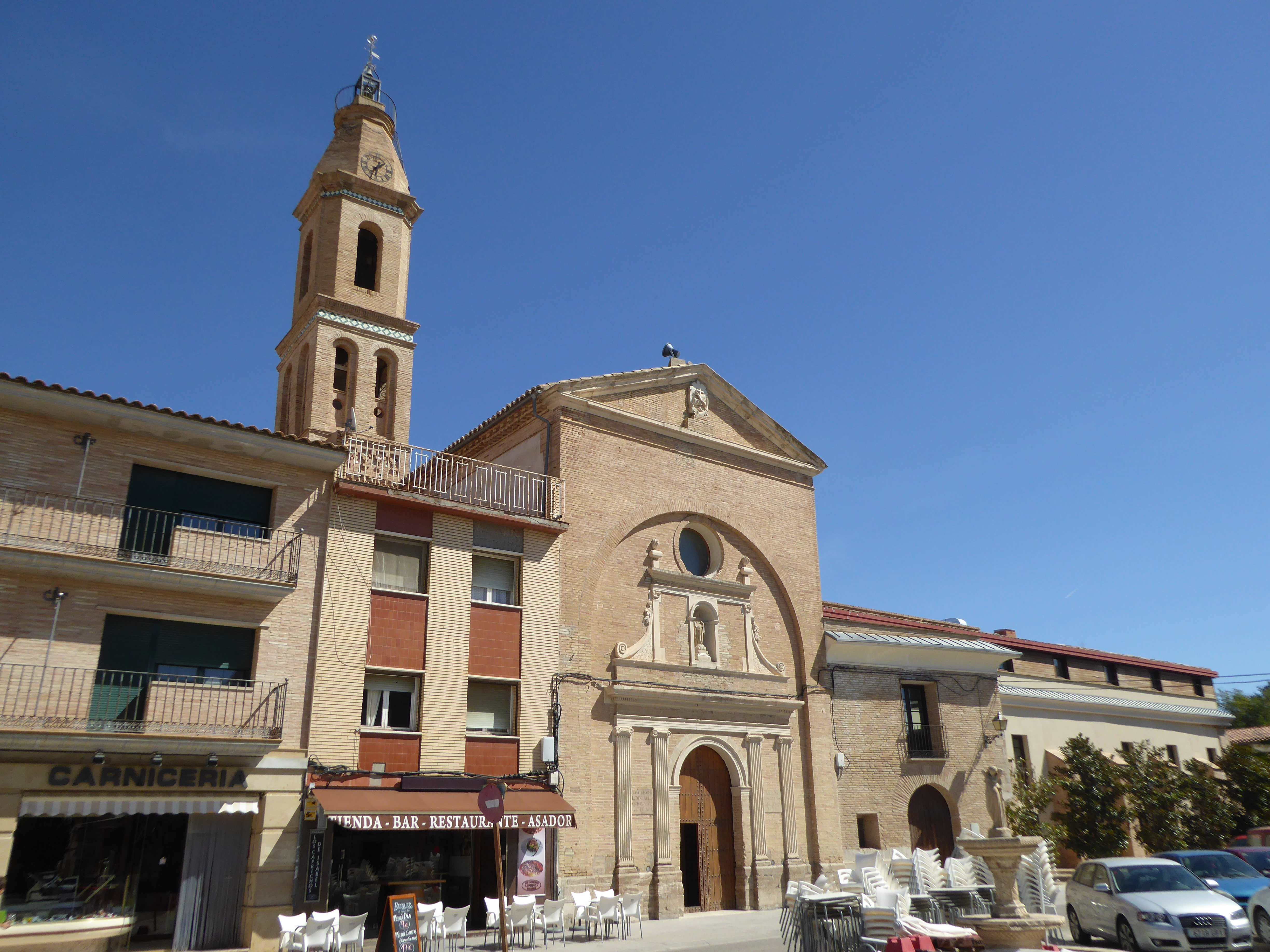 Iglesia y claustro del antiguo convento de franciscanosConvento franciscano de El Salvador